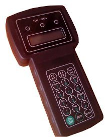 Используется для проверки проездных билетов на основе бесконтактных смарт карт.